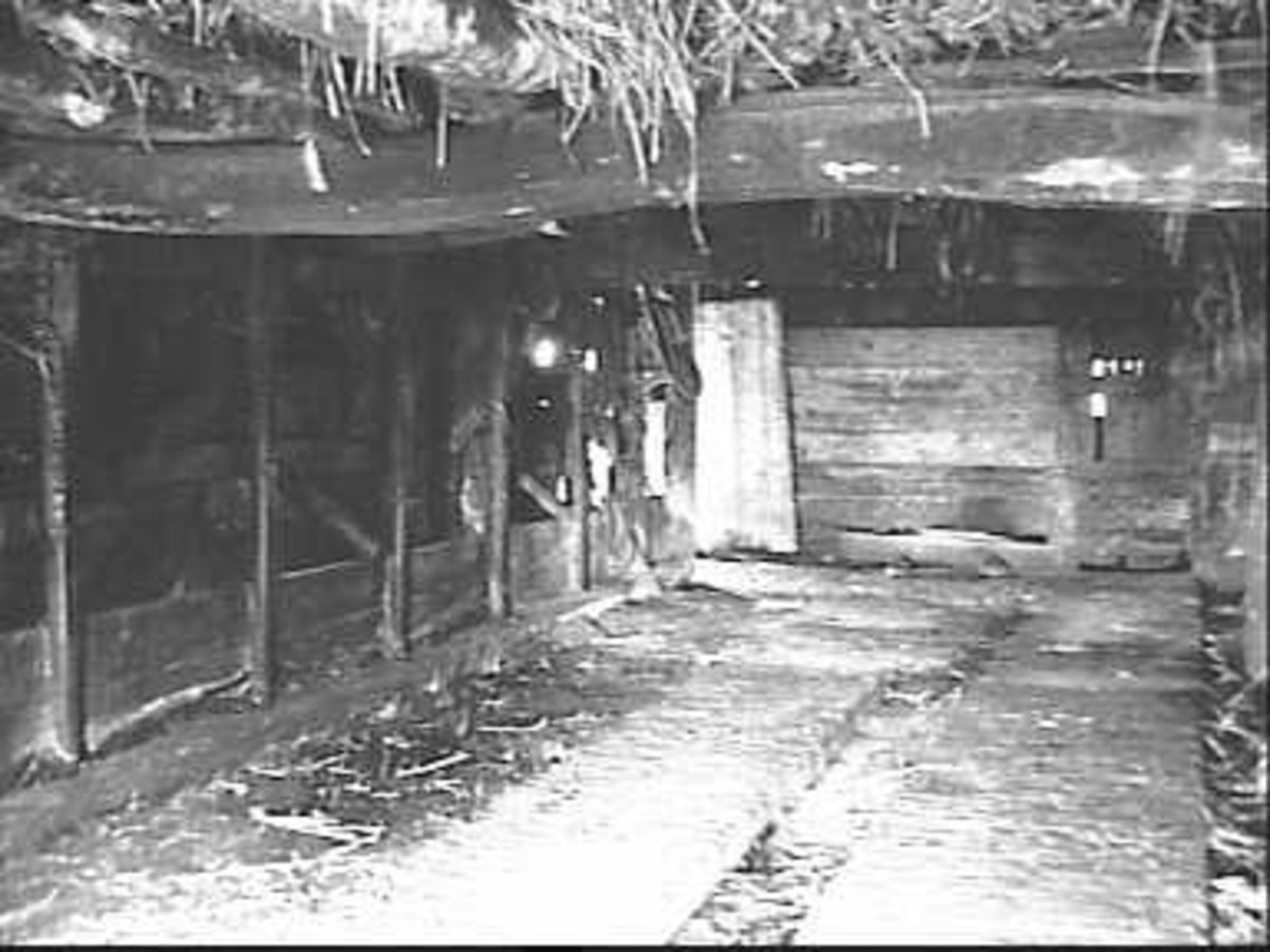 Boerderij Hekman's Boo: interieur van de stal (opmerking: Deze afbeelding hebben wij helaas alleen in deze lage resolutie.)